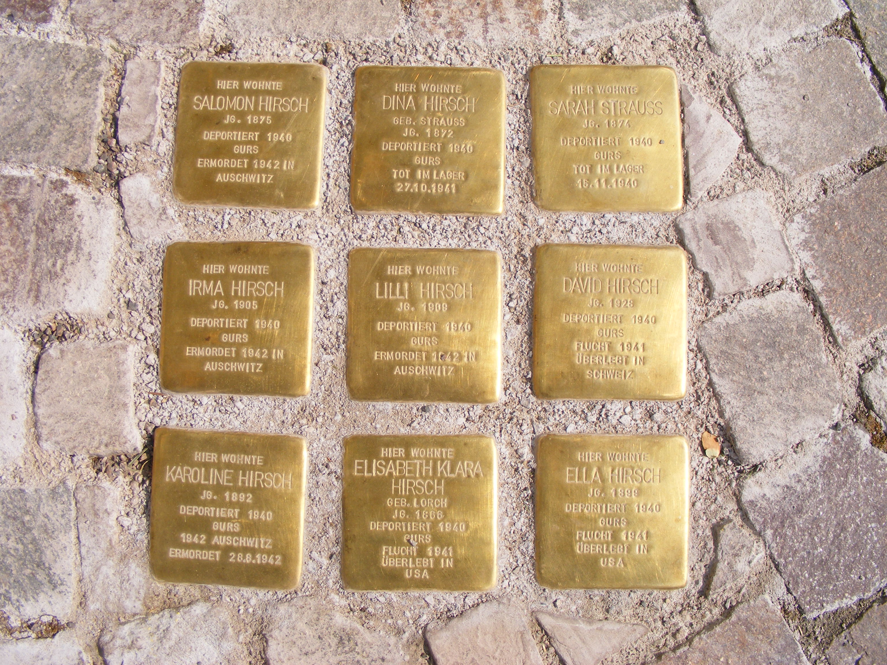 Am 27. März 2009 verlegte Stolpersteine für die neun im Jahre 1940 deportierten Dirmsteiner Juden